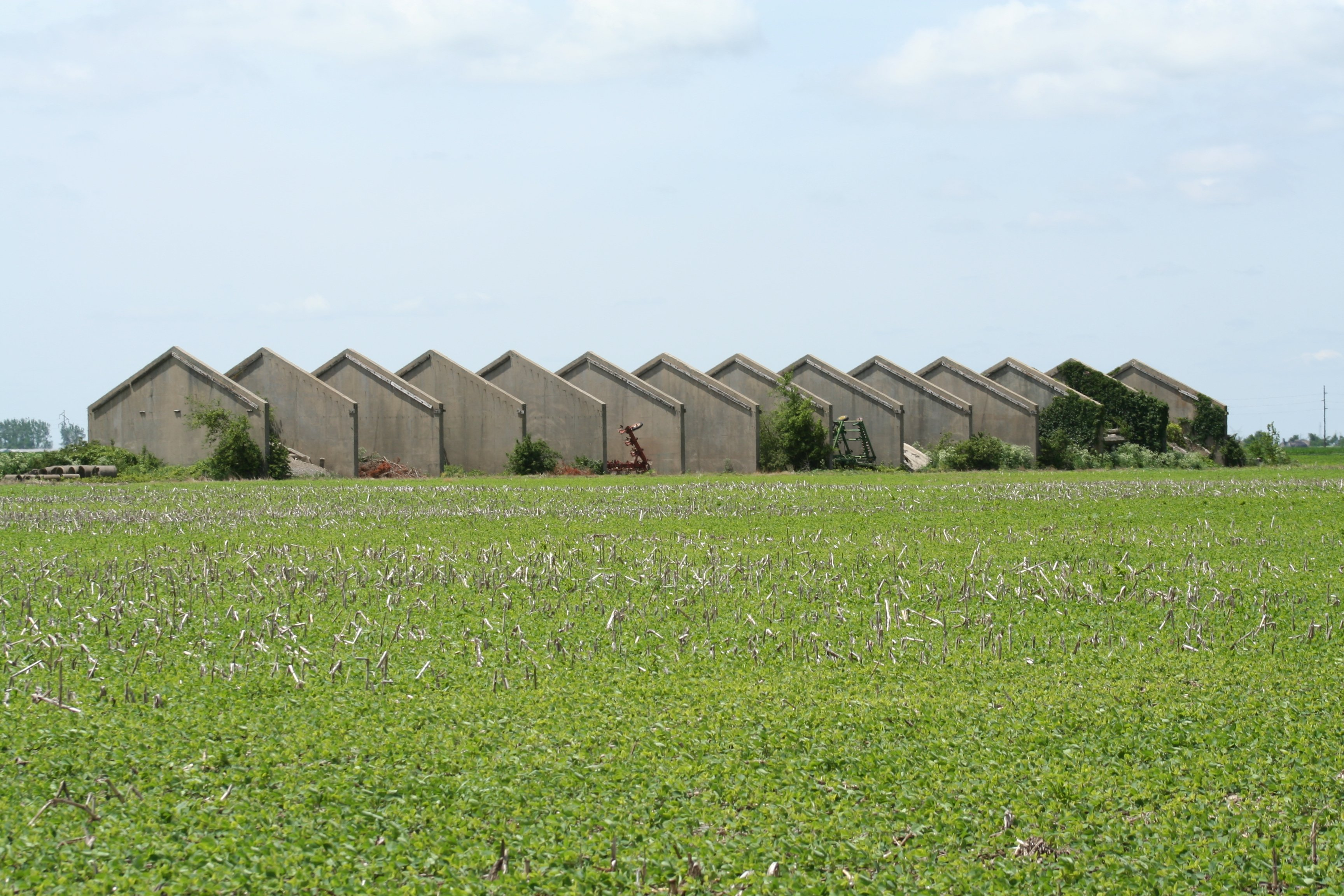 Sangamon_Ordnance_Plant_ruins